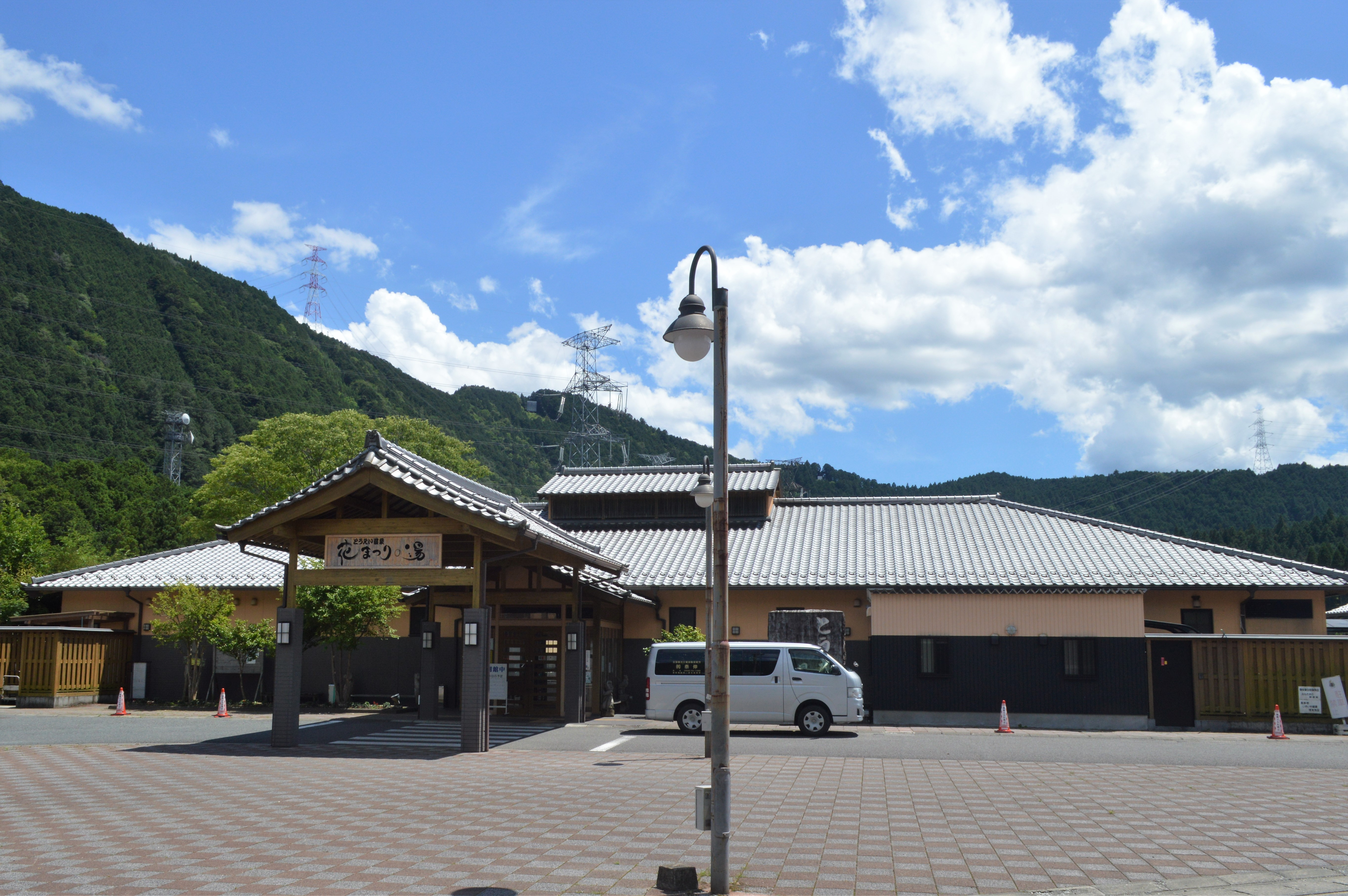 愛知県北設楽郡東栄町にある「とうえい温泉花まつりの湯」。